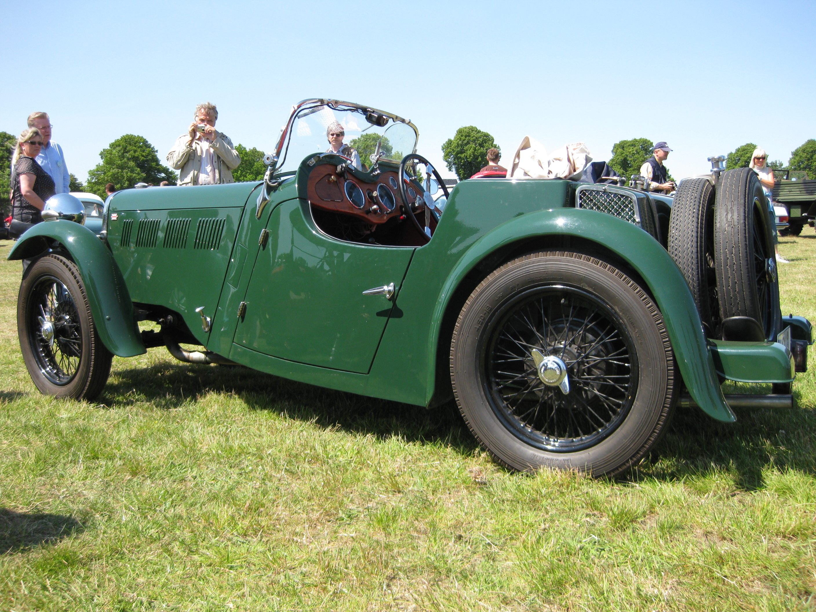 Singer (1941) Seitenansicht